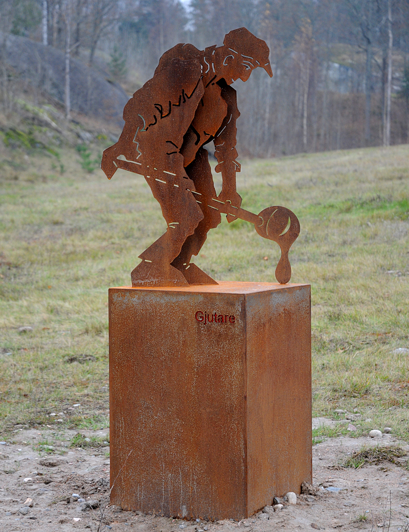 Skulpturen Gjutaren av konstnären Gunnar Carl Nilsson